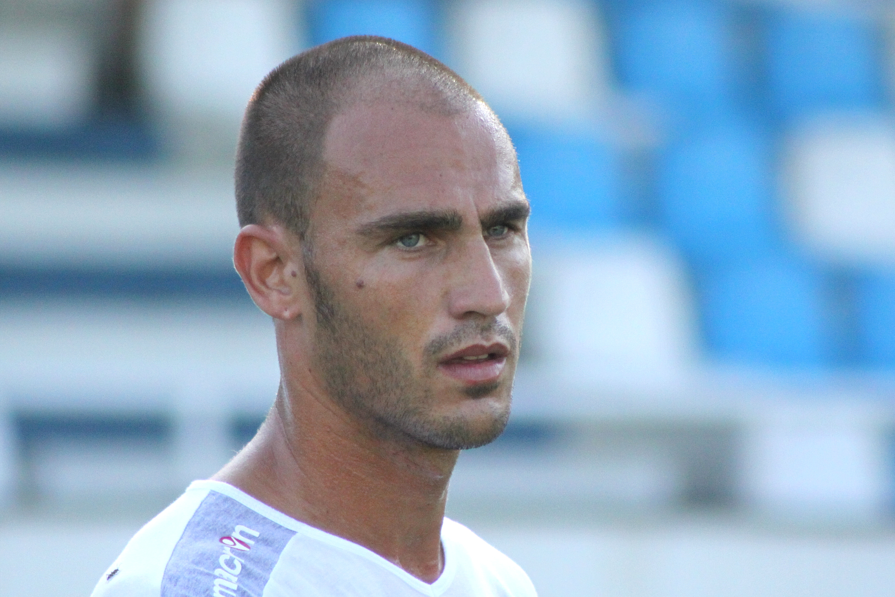 Paolo Cannavaro - SSC Neapel (2) Paolo Cannavaro - Società Sportiva Calcio Napoli